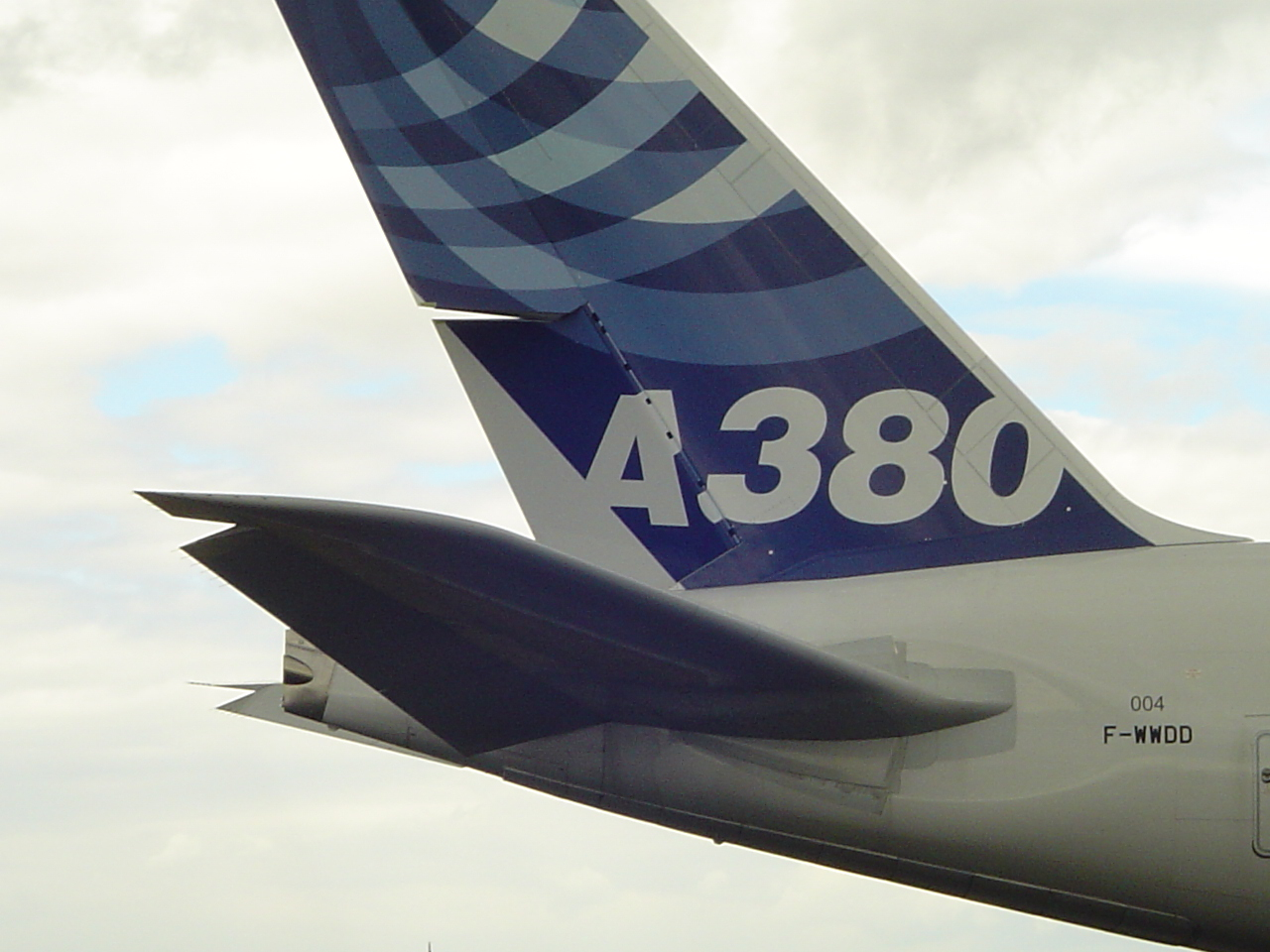 Leitwerk des Airbus A380 auf der ILA 2006